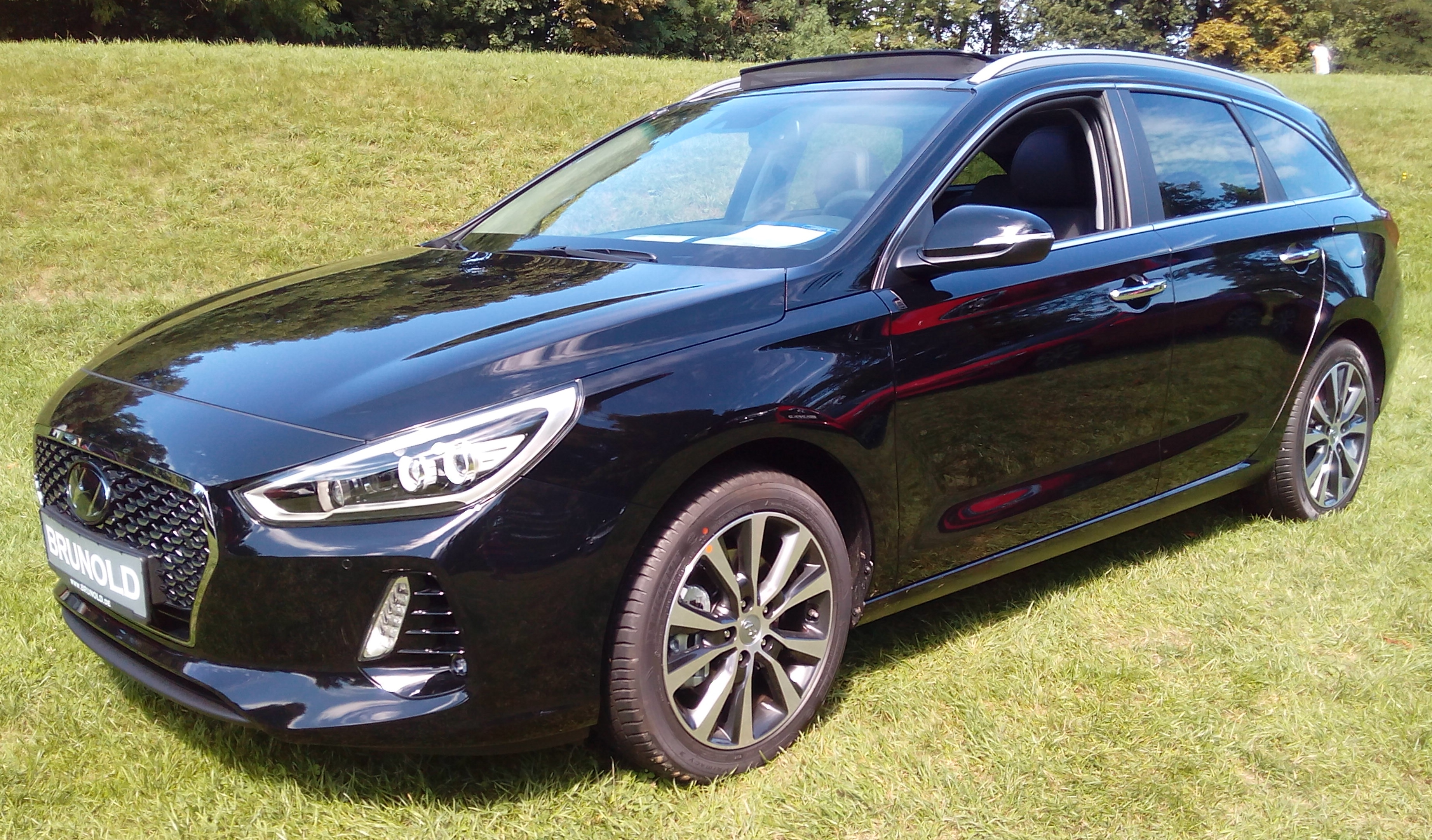 Hyundai i30 Kombi auf der Automesse Monrepos